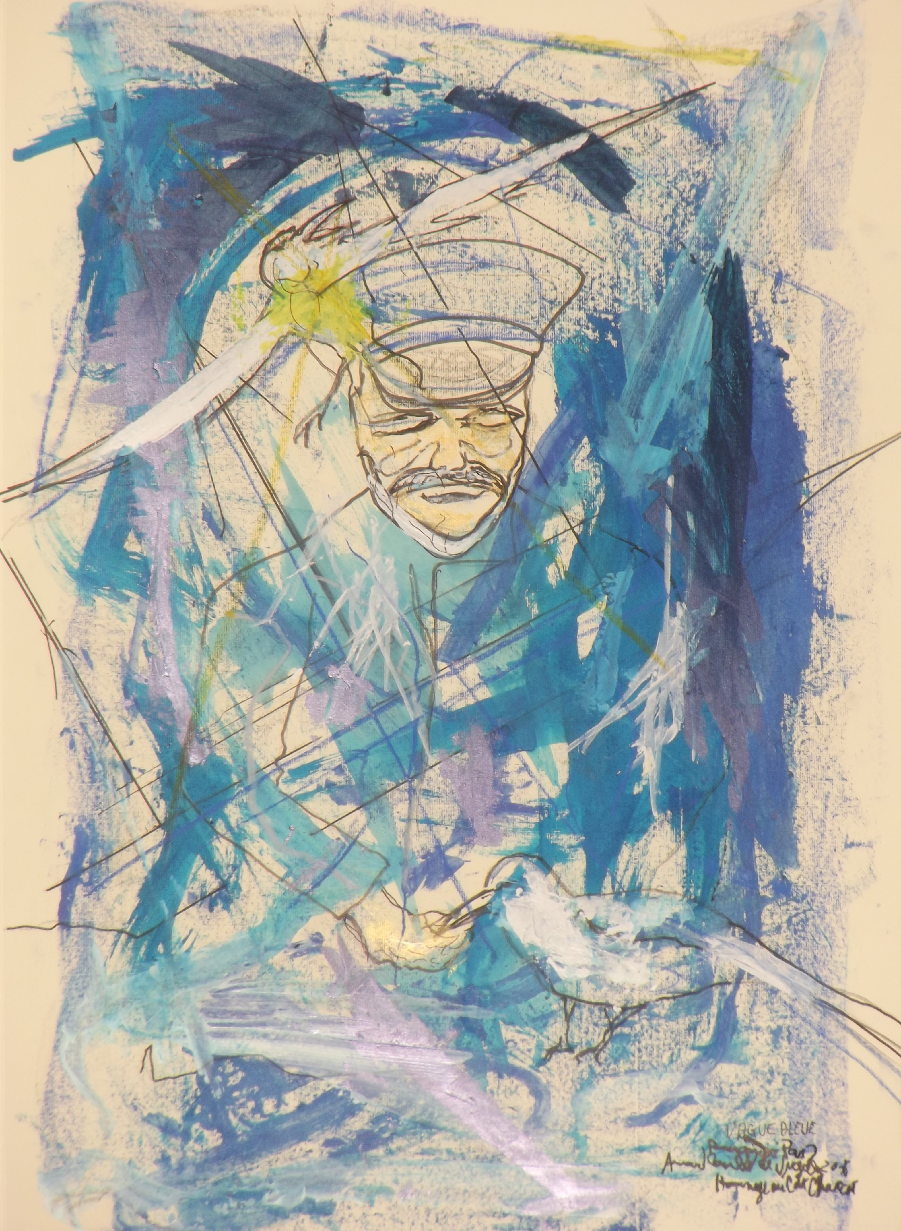 Vague Bleue ou Pourquoi pas hommage au commandant Charcot